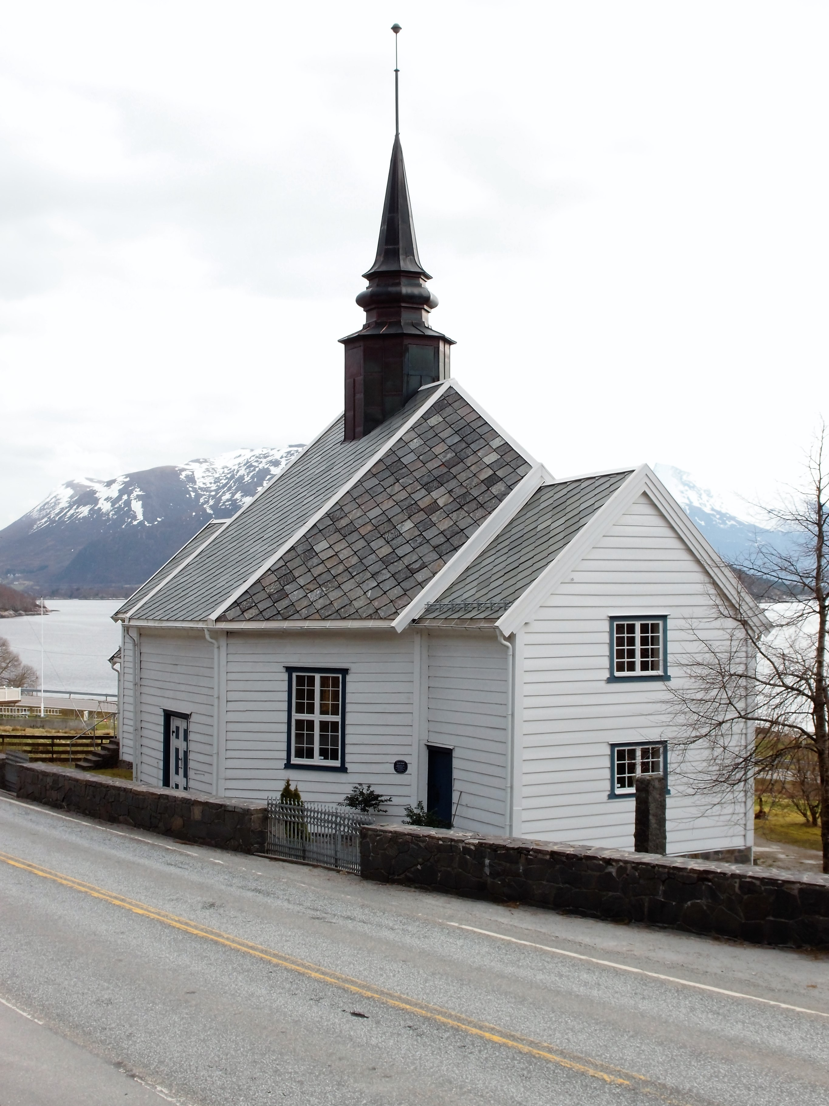 Leikanger kyrkje i Herøy er ei åttekanta trekyrkje på Leikong i Herøy kommune i Møre og Romsdal fylke. Opphavleg stod kyrkja på Sjøholt i Ørskog, der ho hadde stått frå 1807, men vart flytta til Leikong i 1872. Kyrkja ligg ved riksveg 61. Der er ein relativt stor kyrkjegard / gravplass sør og vest for kyrkja.